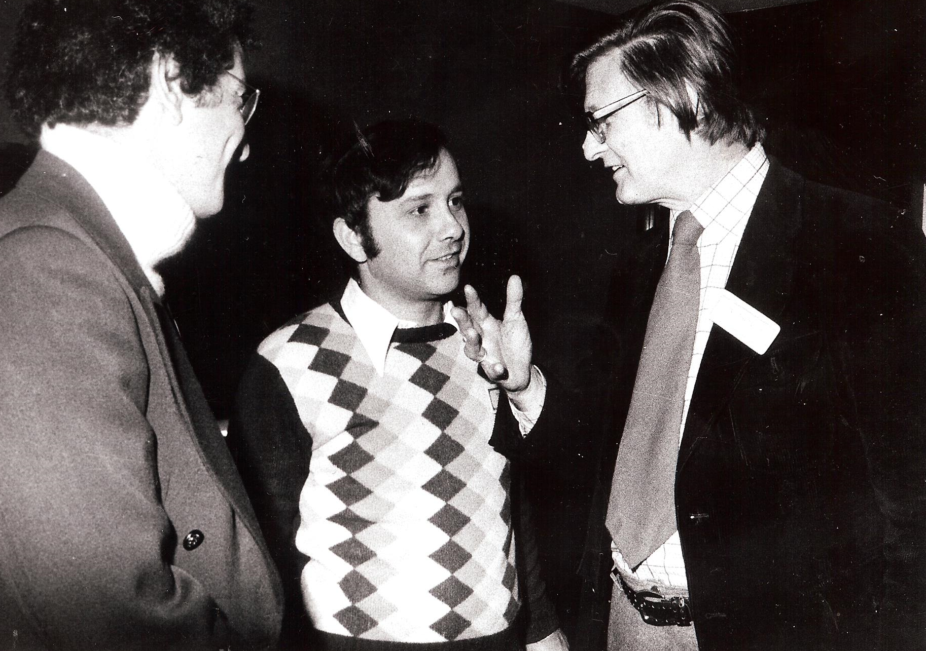 הלל שמיד, ~1975